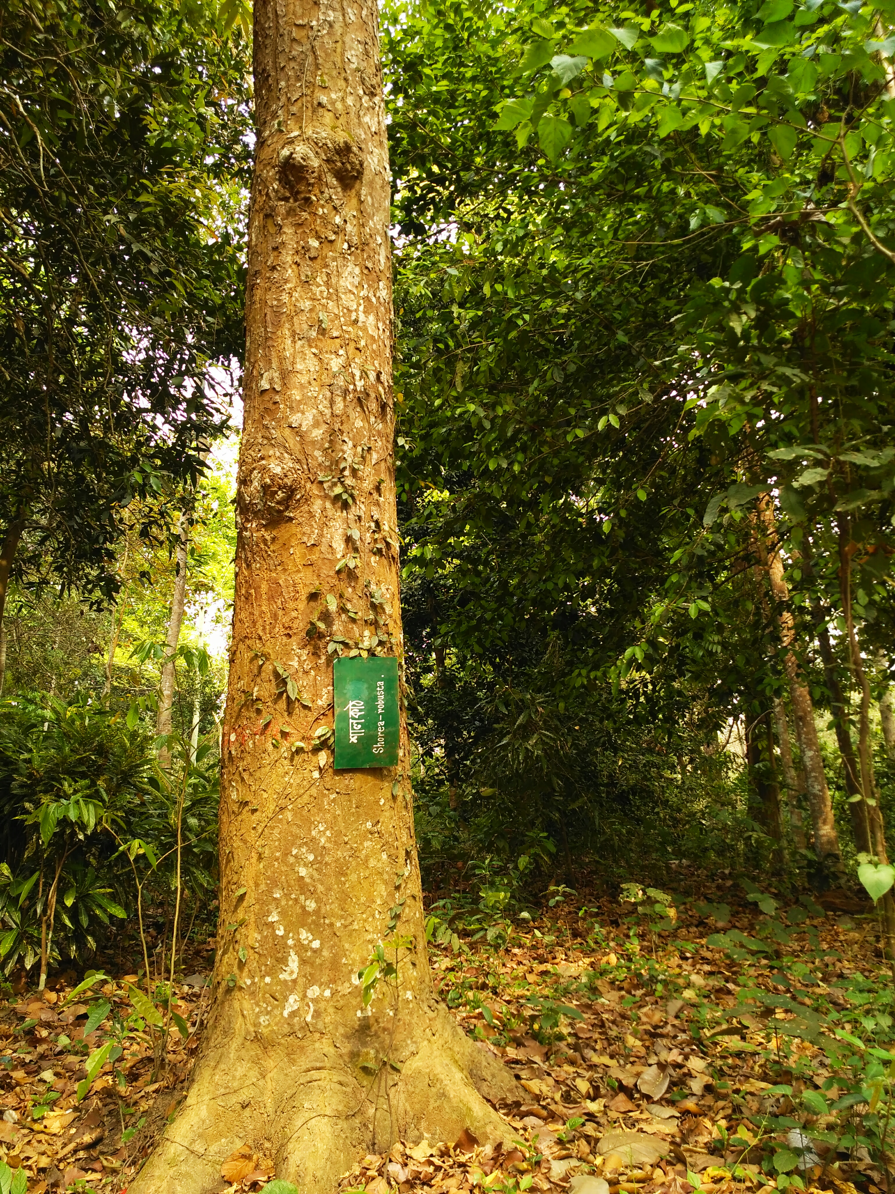 View of trunk of a Shorea robusta, Shala tree in Lawachara National Park, Bangladesh. 2016. Bangla : শাল গাছের কান্ডের একটি দৃশ্য, লাউয়াছড়া জাতীয় উদ্যান, বাংলাদেশ। ২০১৬।